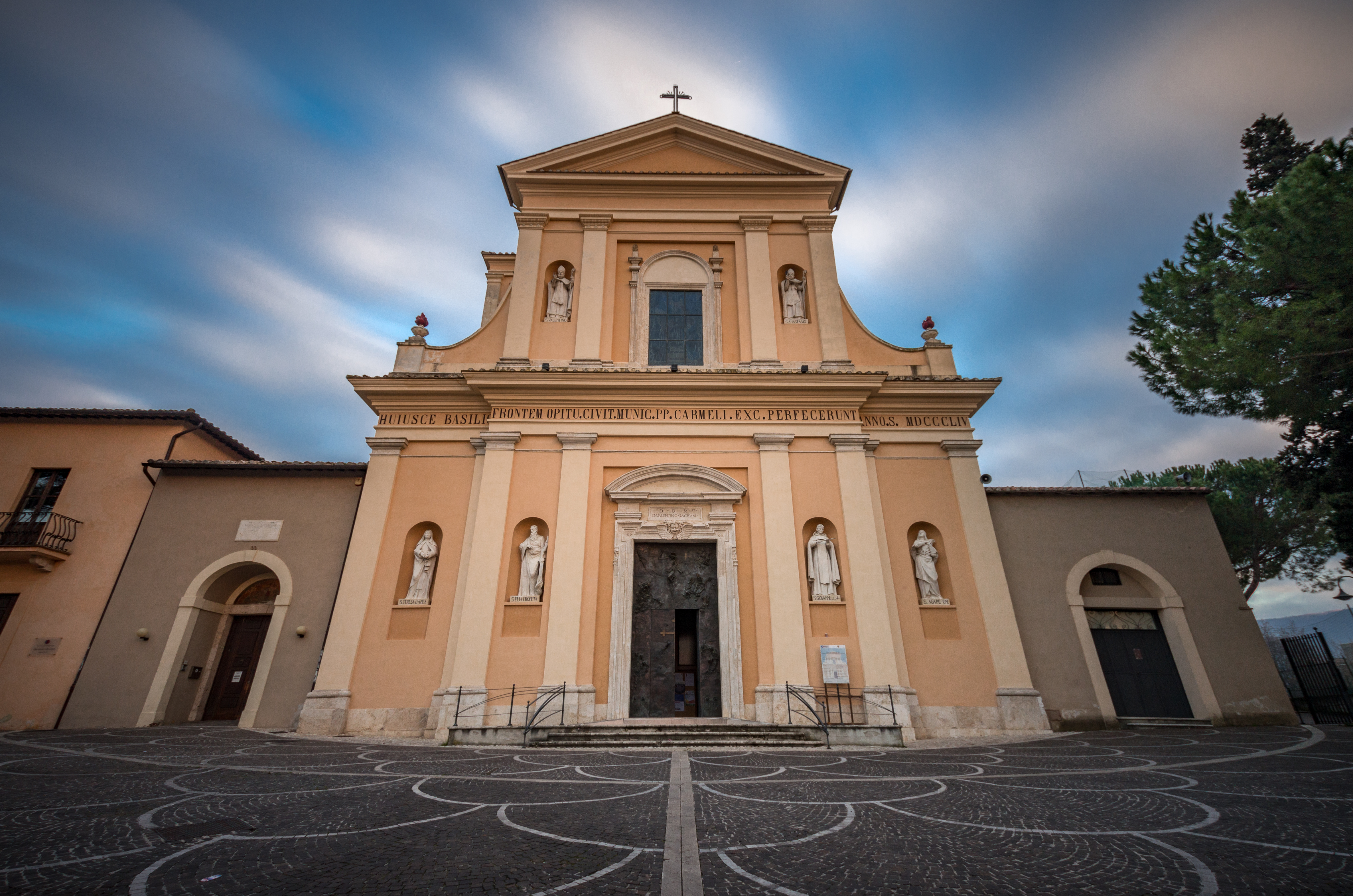 La basilica di San Valentino è uno dei monumenti religiosi della città di Terni. Il primo edificio risale al IV secolo, e fu costruito sopra la tomba del martire San Valentino, presso un'antica necropoli paleocristiana. Fu distrutta nel VI secolo dai Goti, e ricostruita poi nel VII secolo in due fasi distinte, la prima tra il 625 e il 632 e la seconda tra il 642 e il 648, quando la gestione dell'edificio fu affidata ai Benedettini. Nel 742 la Basilica fu teatro dello storico incontro tra il re longobardo Liutprando e papa Zaccaria. Il luogo d'incontro fu scelto dal sovrano dei Longobardi proprio per la presenza della salma del santo che si diceva avesse proprietà taumaturgiche. In quell'incontro Liutprando donò alla Chiesa di Roma diverse città, tra le quali Sutri. L'attuale edificio risale però al XVII secolo, quando sotto il pontificato di Paolo V vennero iniziate con successo le ricerche delle reliquie del santo nel luogo in cui sorgevano le prime chiese. La nuova basilica fu ultimata nel 1618 quando vi furono traslati i resti del corpo del santo ospitati nel frattempo nella cattedrale di Terni. Nel 1625, in occasione di una visita dell'Arciduca Leopoldo d'Austria, costui si fece carico, prima di ripartire, per le spese della costruzione di un nuovo altare maggiore in marmo che venne completato nel 1632. Dietro l'altare maggiore si trova il coro con la cosiddetta confessione di San Valentino, ovvero un altare, costruito proprio sopra la tomba del martire, al centro del quale si trova un dipinto risalente al XVII secolo che celebra il martirio del santo.